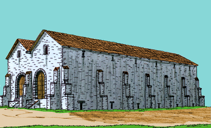 Rekonstruktionsversuch eines Getreidespeichers im Kastell Housesteads/Vercovicium, Hadrianswall (GB), Bauphase II, frühes 3. Jahrhundert n.Chr.